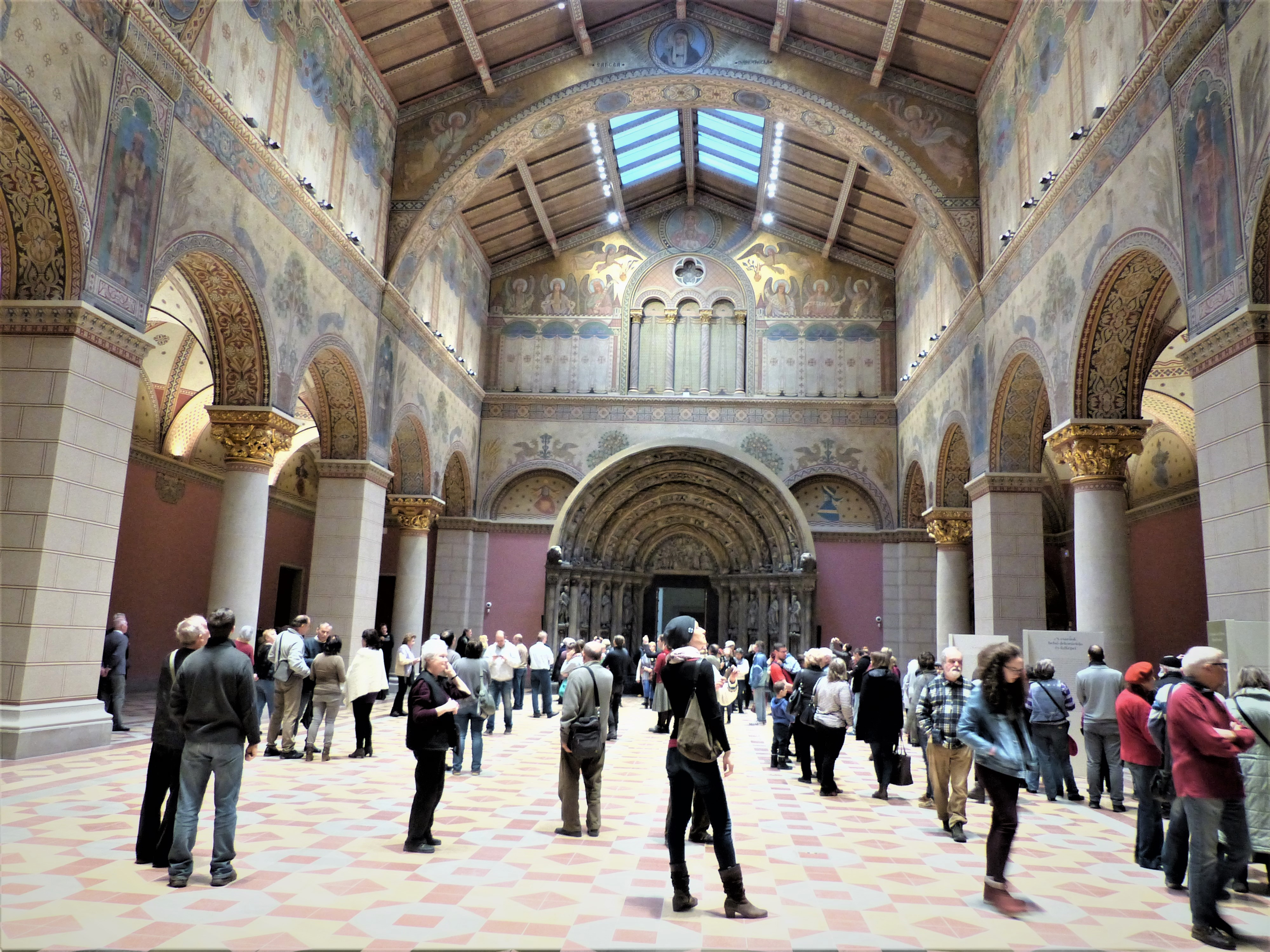 A felvétel 2018. március 16-án, egy nappal a 15-i megnyitás után készült a Szépművészeti Múzeum Román csarnokában.